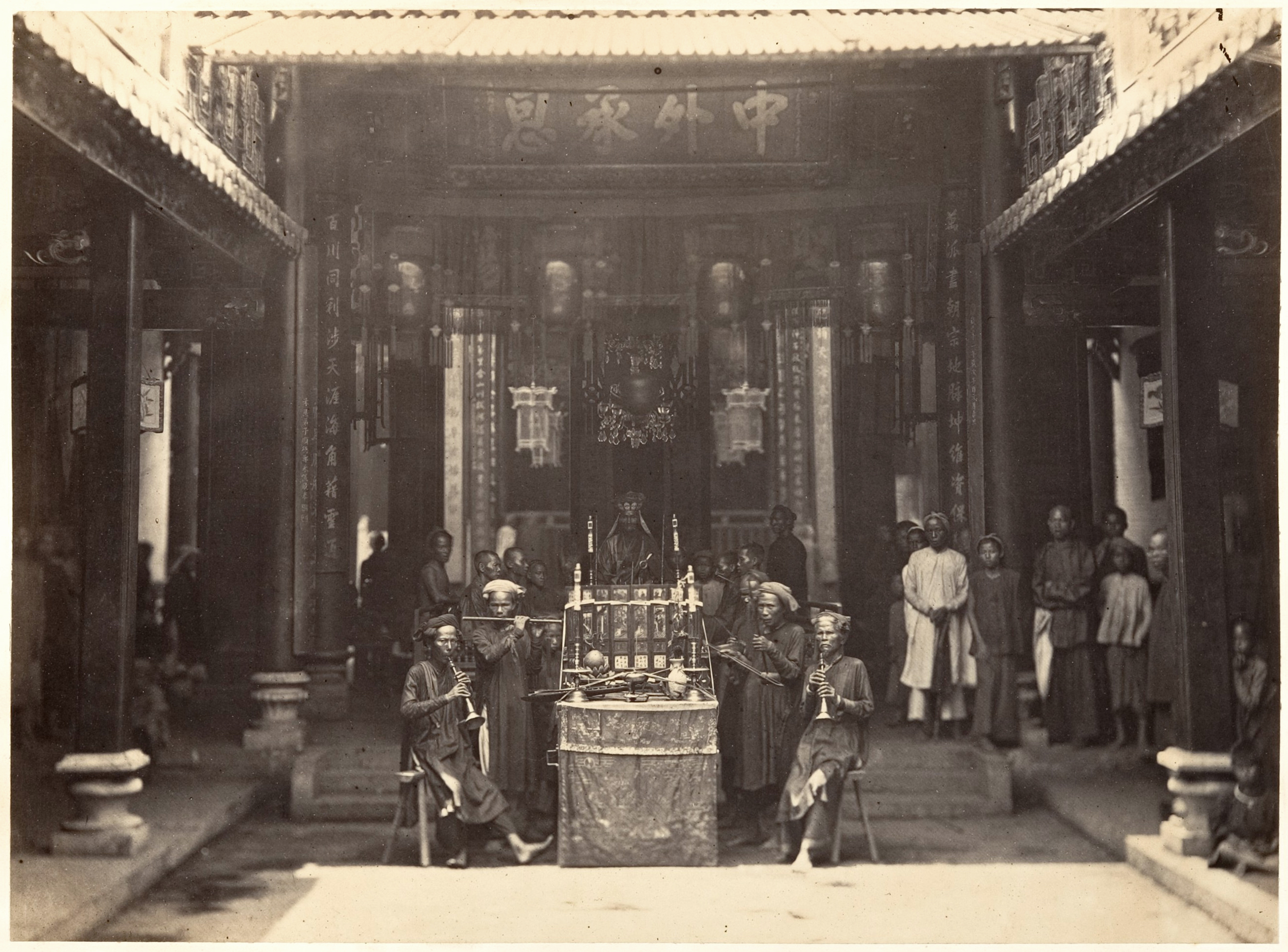 Cérémonie religieuse dans la Pagode Chinoise de Cholon, Saïgon, Cochinchine. Photo d'Emile Gsell (années 1866)